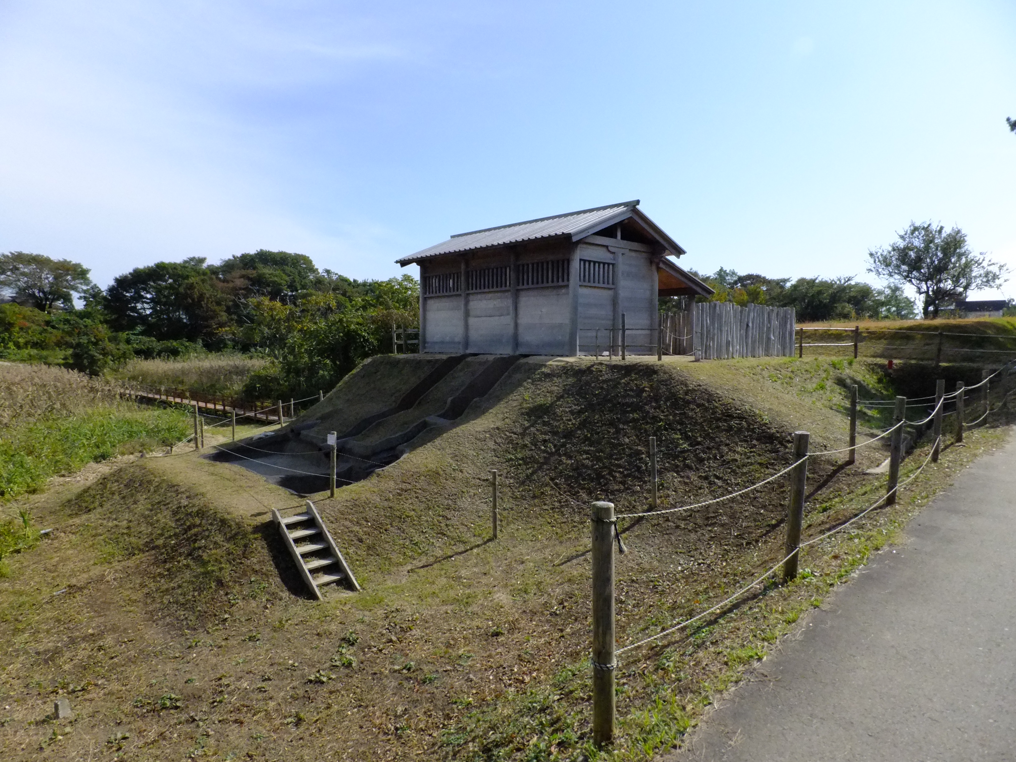 秋田城跡水洗トイレ遺構（復元）